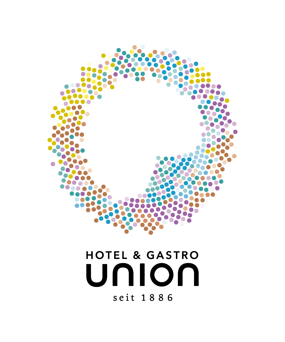 Von der Mathematik zu unseren Mitgliedern – Die Entstehung unseres Schlüsselbildes. Als «Ring» wird nicht nur ein geschlossener Gegenstand bezeichnet, sondern auch ein Kreis von Personen mit ähnlichen Interessen.